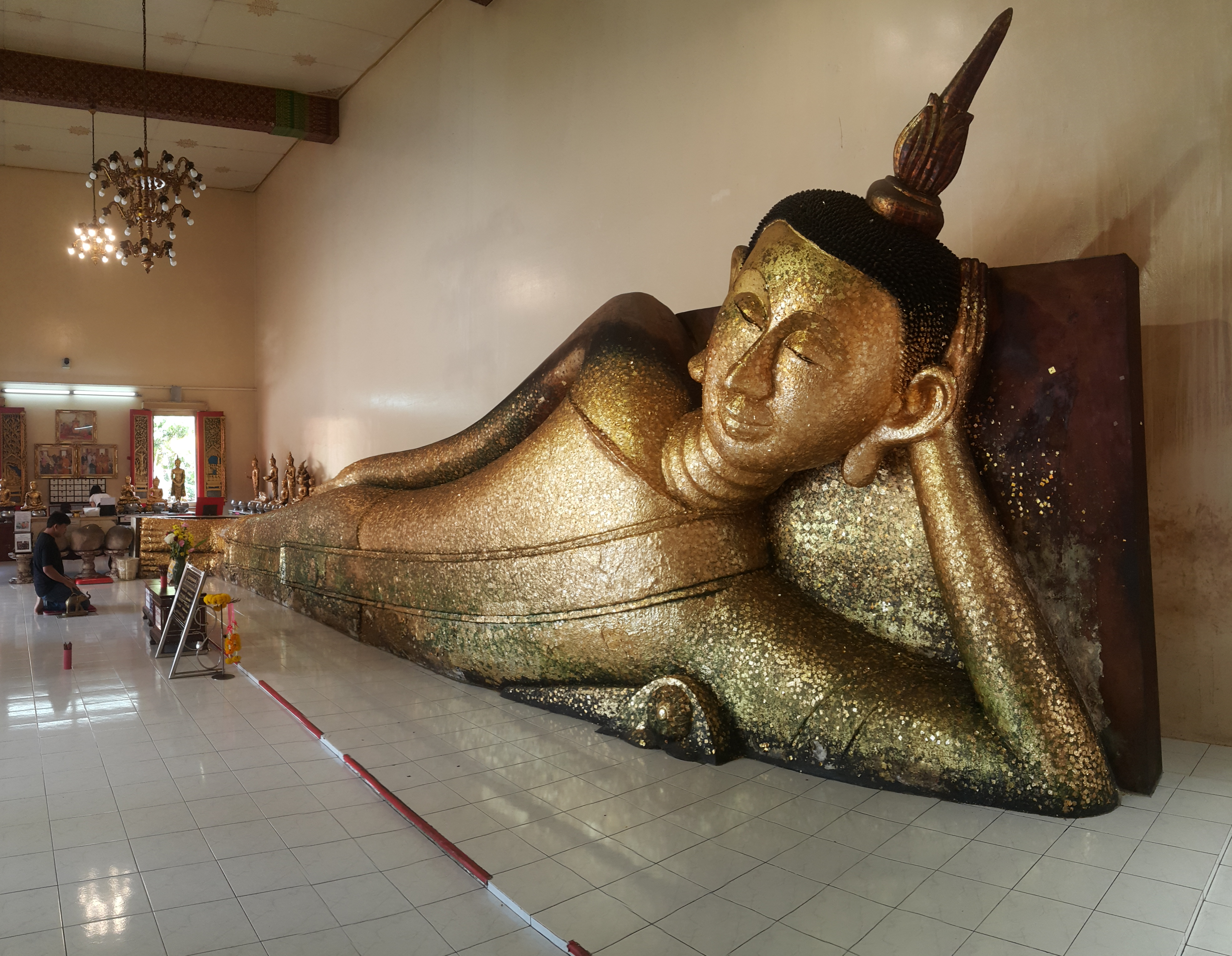 วัดป่าประดู่ พระอารามหลวง